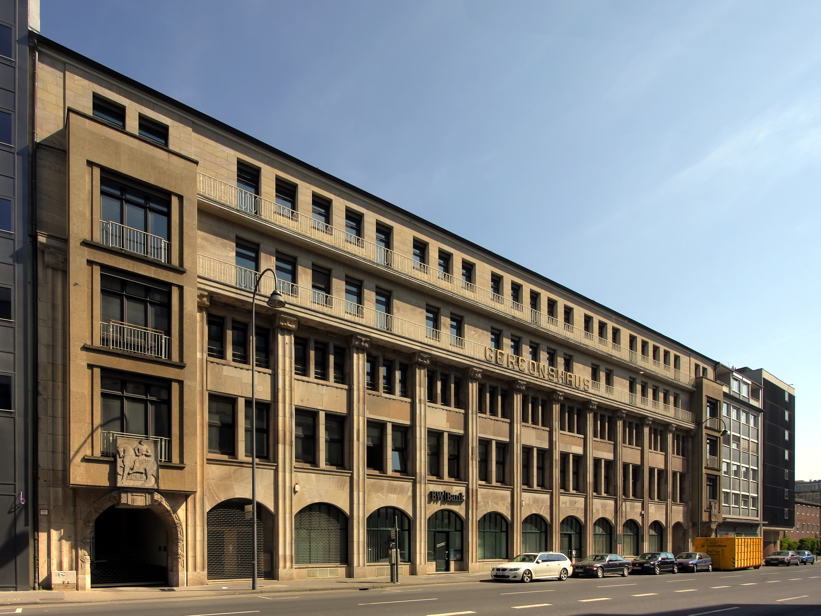 Gereonshaus, Gereonstraße 18-32, Köln. Architekt: Carl Moritz, Baujahr: 1909/10 This is a photograph of an architectural monument.